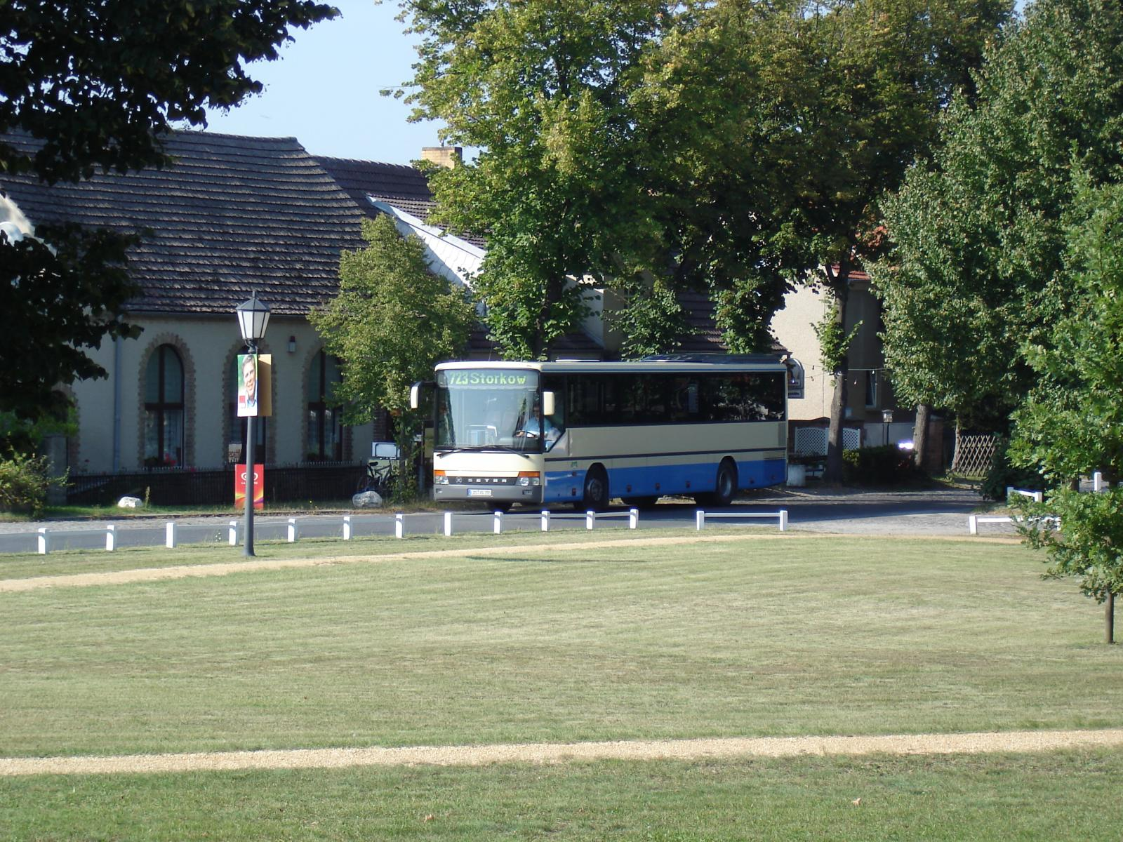 Bus der RVS (Regionale Verkehrsgesellschaft Dahme-Spreewald) auf der Linie 723 Richtung Storkow in Kolberg (Brandenburg) kurz vor der Haltestelle "Kolberg Dorf" am Platz der Einheit